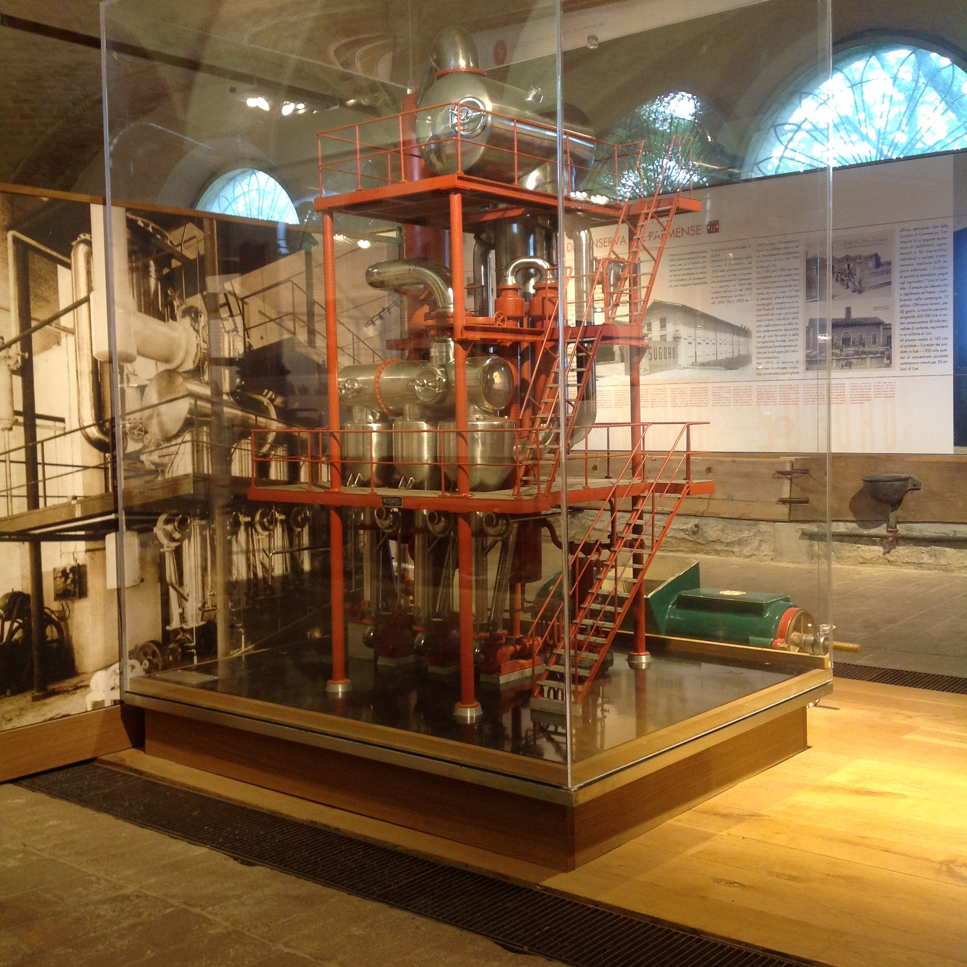 Modello in scala in metallo di impianto di evaporatore continuo "Ultra 300" mod. 001 della ditta Ing. A. Rossi di Parma